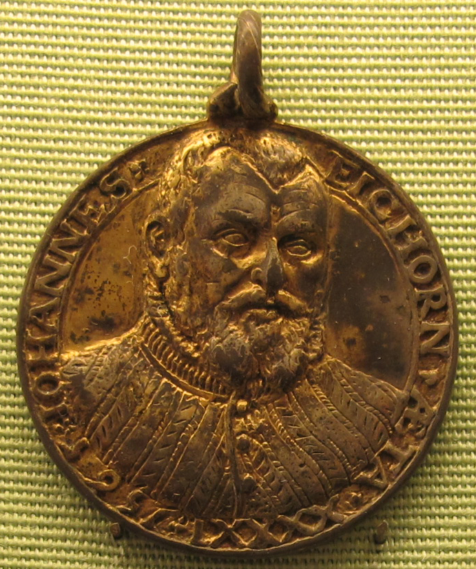 Meister des eichhorn, johann eichhorn, 1565